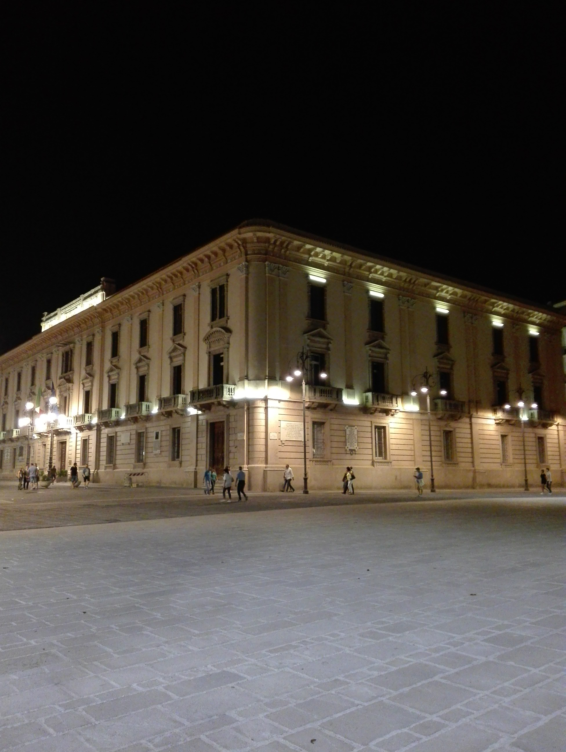 Palazzo del Governo di Avellino da Piazza della Libertà. Prima di ospitare gli uffici della Prefettura era un conventi dei Frati Domenicani.